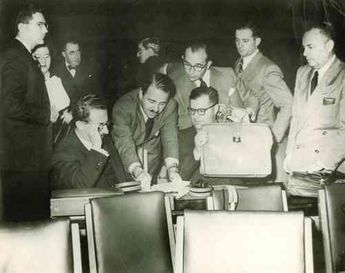 התייעצות יושבים: אבא אבן/ סיי קנן/ משה שרת 8